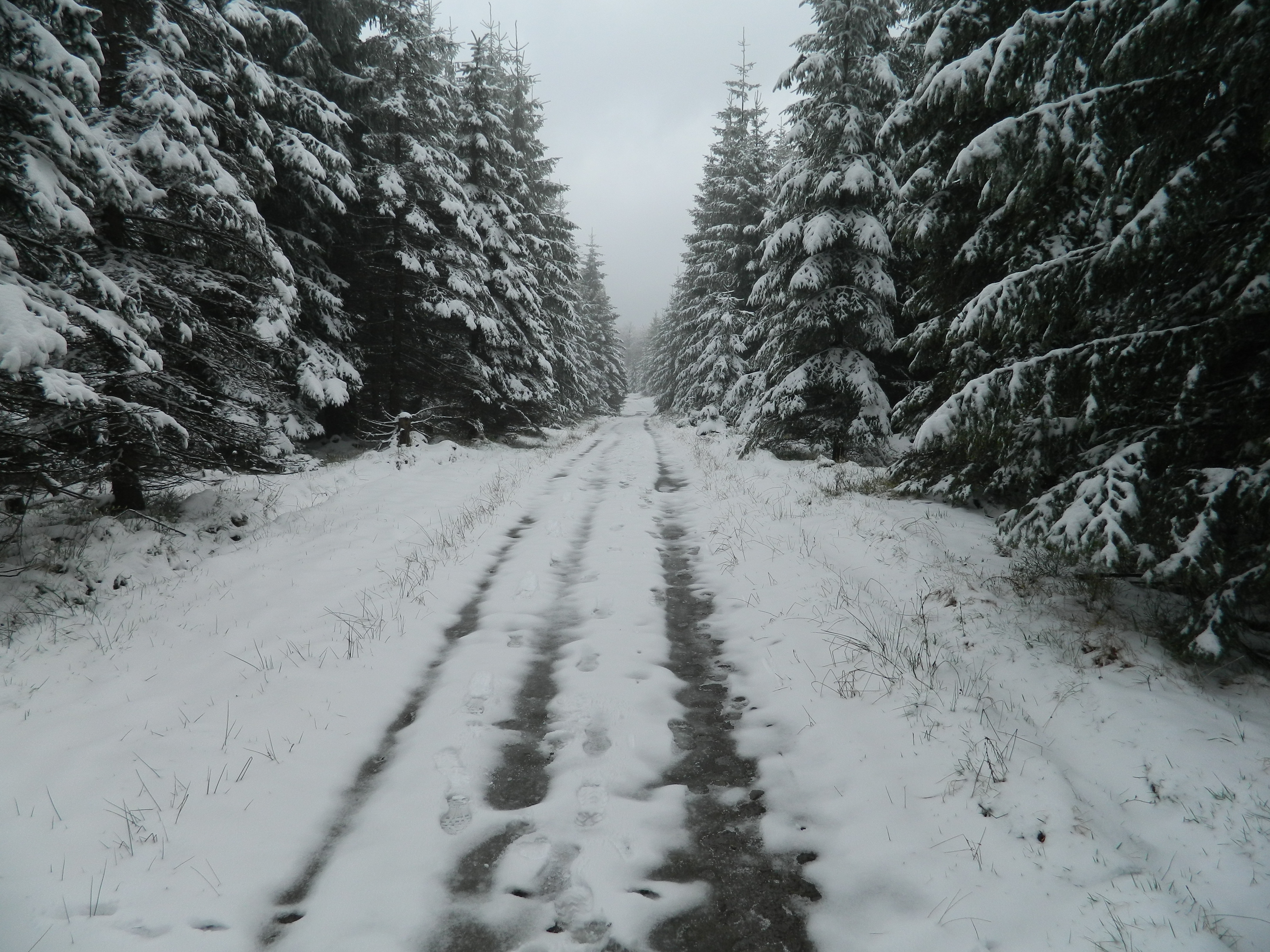 Vrcholové partie hory Šindelná v Moravskoslezských Beskydech.